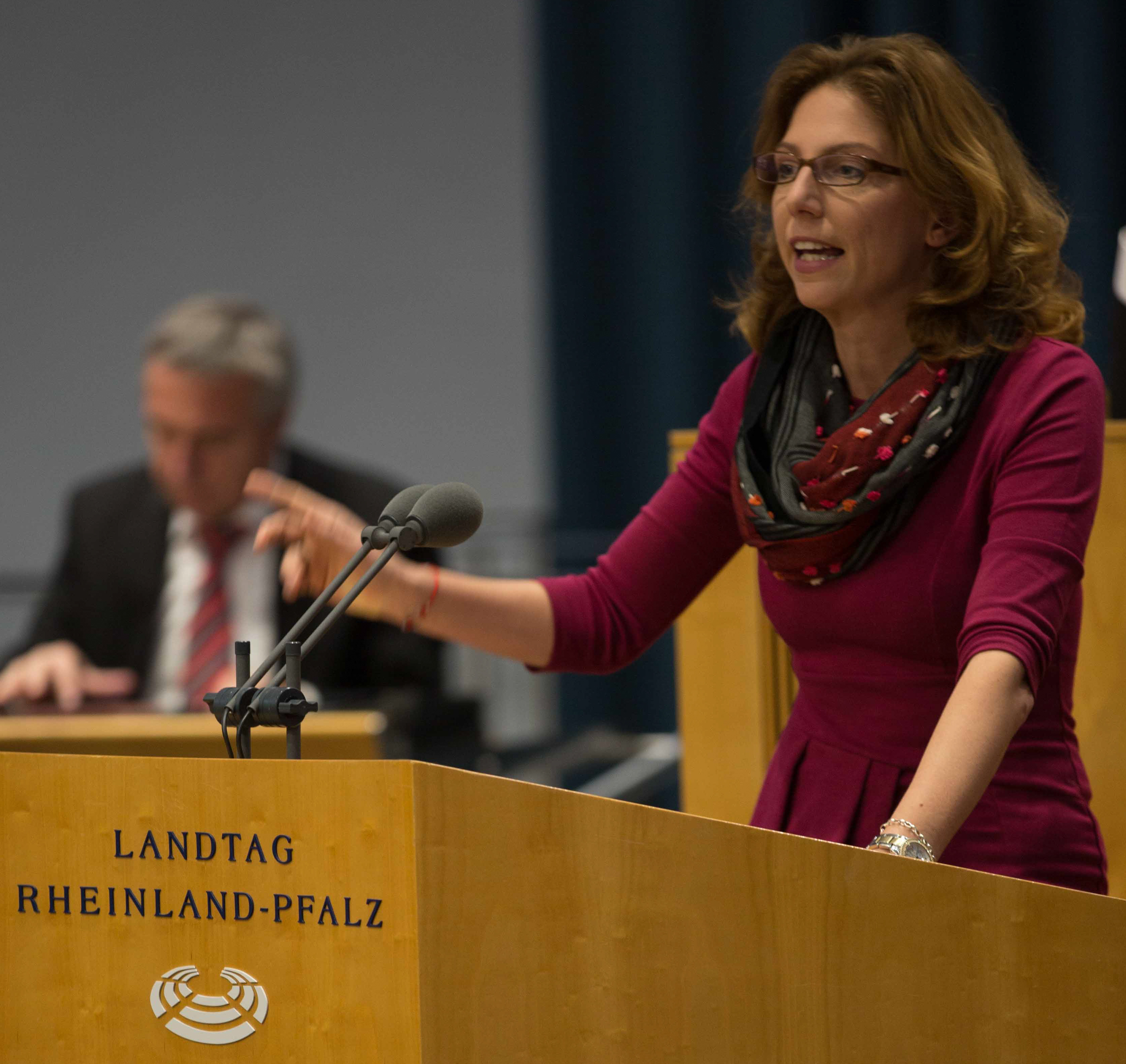 Sabine Bätzing-Lichtenthäler am 17.11.2016 im Plenum des rheinland-pfälzischen Landtages